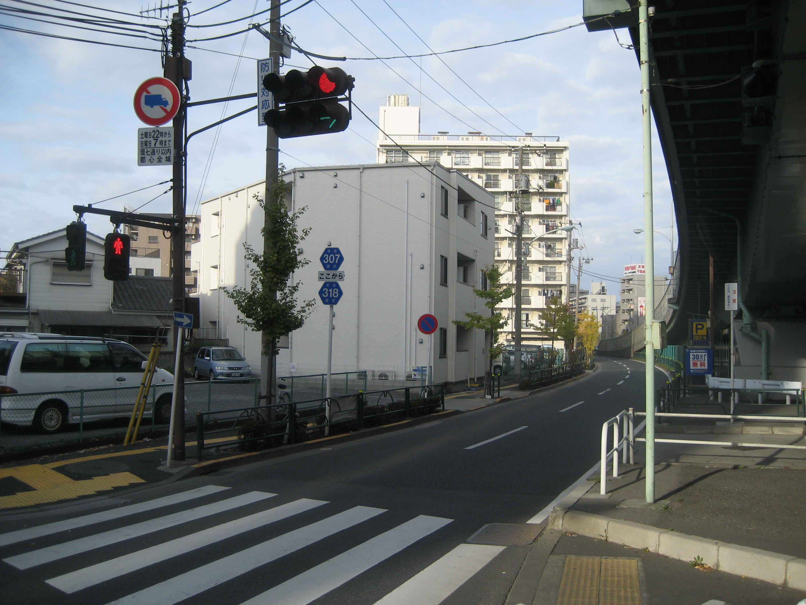 環七通り足立区大谷田橋交差点付近（大谷田陸橋内回り側道を撮影）